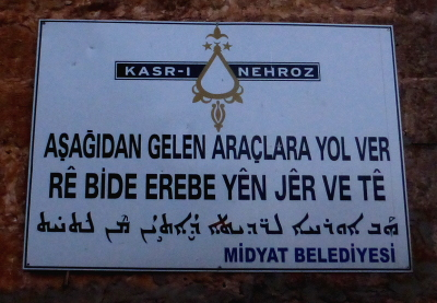 Dreisprachiger Verkehrshinweis in der Altstadt von Midyat, von unten kommenden Fahrzeugen Vorfahrt zu gewähren, in Türkisch, Kurdisch (Kurmanci) und Syrisch-Aramäisch (Kthobonoyo)